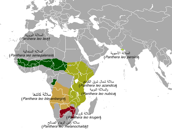 خارطة تُظهر موطن سُلالات الأسود المُعترف بها (Panthera leo) خلال النصف الثاني من القرن العشرين (سُلالتا azandica وnubica لم يوضع موطنهما منفصلاً لصغر حجم موطن سلالة azandicus (شمال شرق الكونغو) ولعدم إمكانية إدراجها في الخارطة الأصليّة) ::المرجع: ::*Haas, S.K.; Hayssen, V.; Krausman, P.R.. Mammalian species - Panthera leo. 2005 Mammalian Species (762): 1-11. pdf